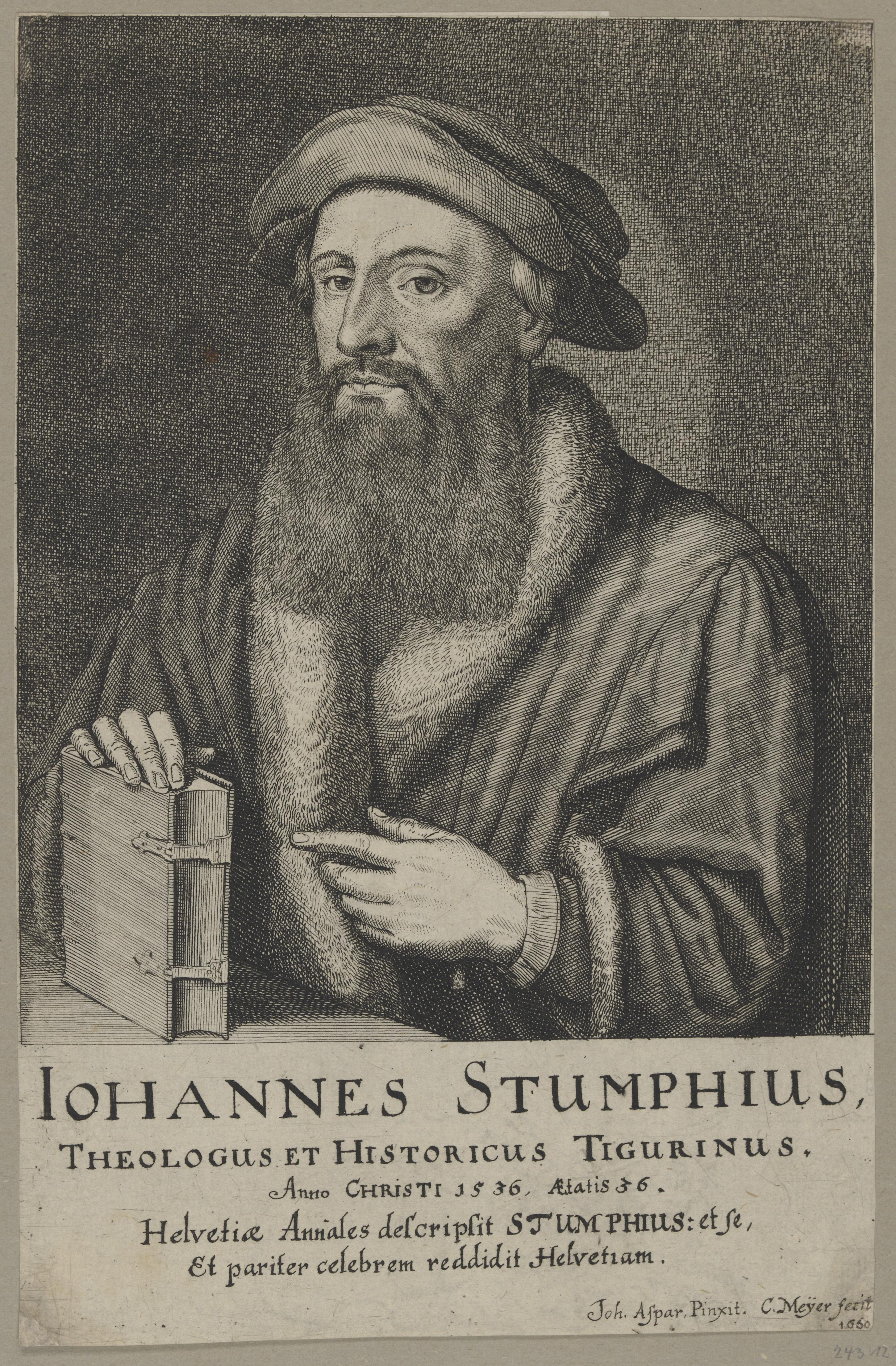 Johannes Stumpf im Alter von ca. 36 Jahren. Radierung von Conrad Meyer (1618-1689) aus dem Jahr 1662 nach einer Vorlage eines Gemäldes von Hans Asper, 1536, heute im Landesmuseum Zürich.